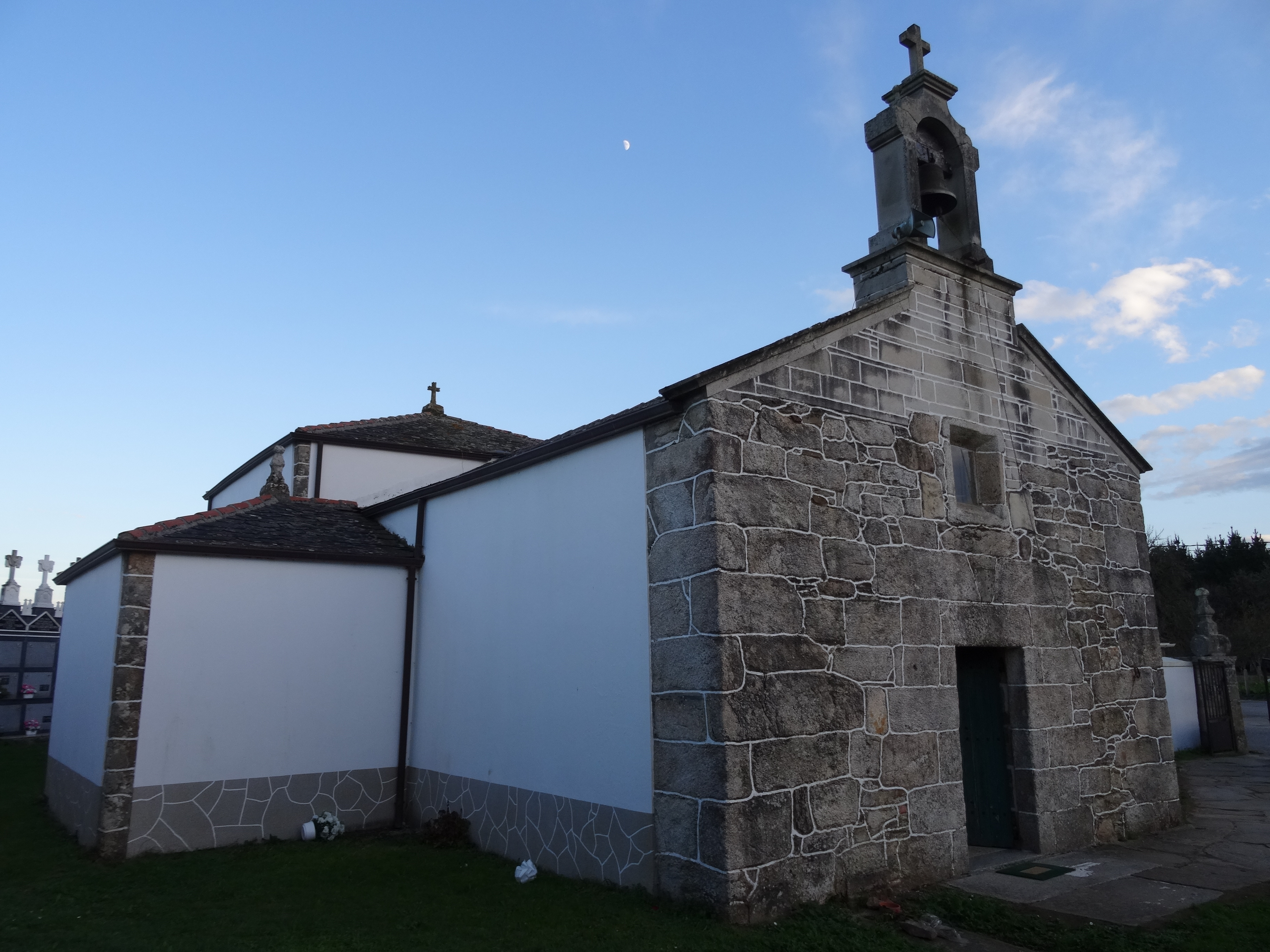 Igrexa de Santa Eulalia en Begonte.